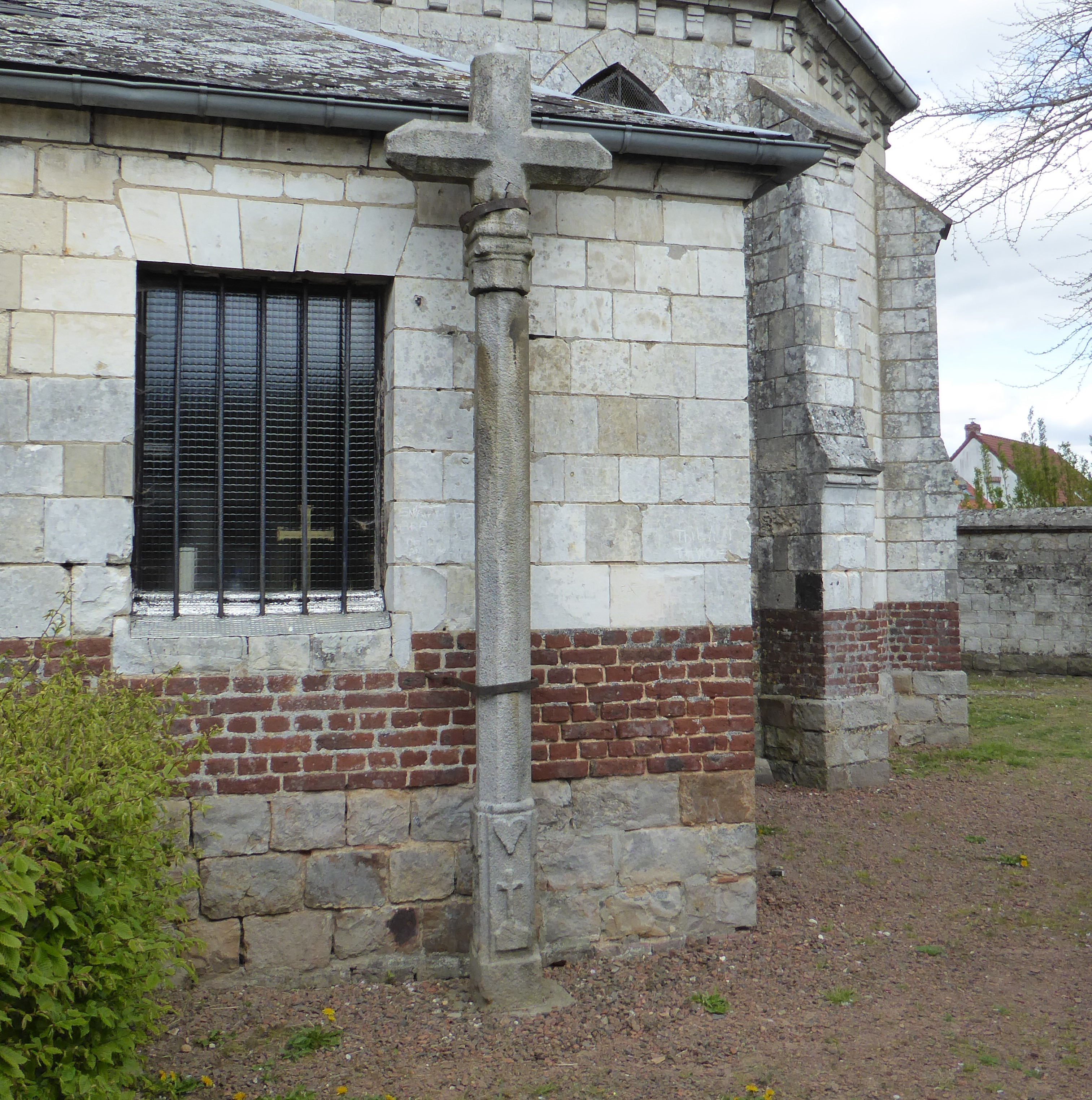 Croix de grès, près du mur sud de la sacristie de l'église de Villers-au-Bois Pas-de-Calais.-Hauts-de- France .